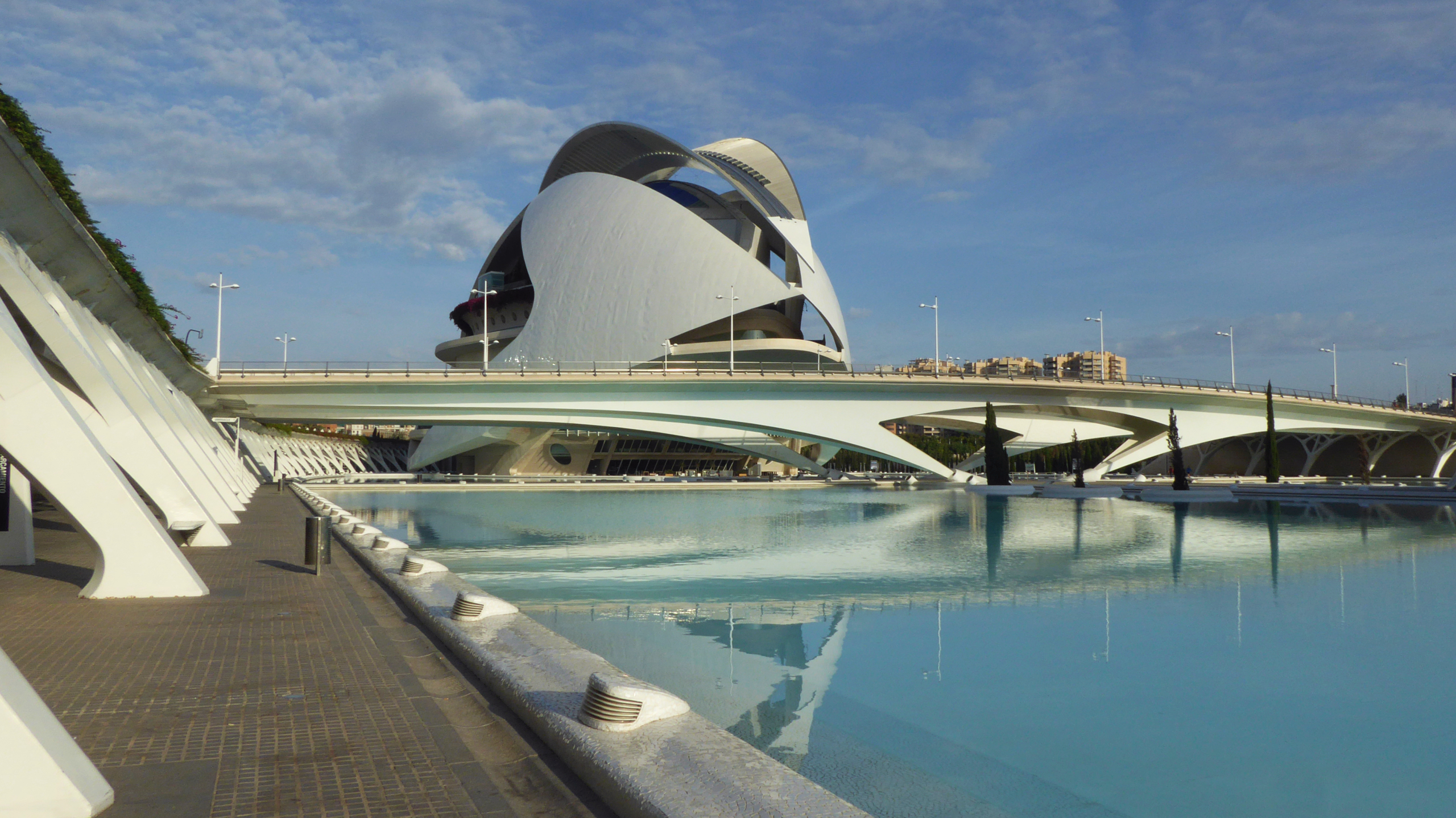 Pont de Montolivet vor El Palau de les Arts Reina Sofía (aus dem Jahr 2005). Die Oper in Ciudad de las Artes y las Ciencias in Valencia, Spanien. Foto Wolfgang Pehlemann P1140051